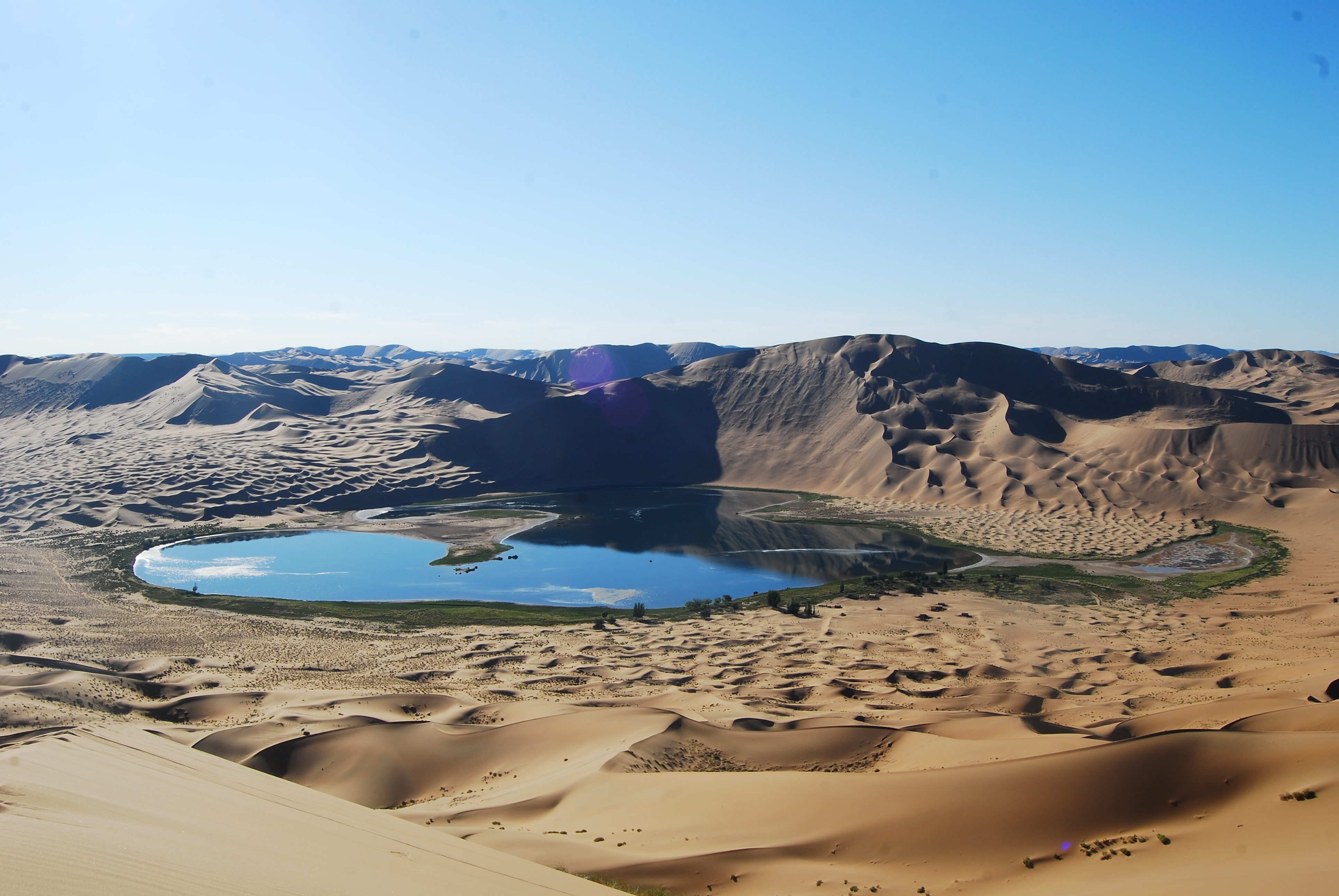 Auf der Düne in Richtung Westen mit dem See "Yinderitu"